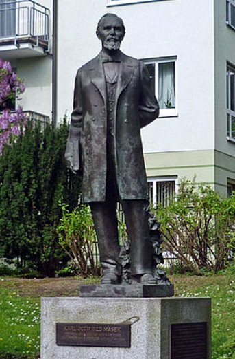 Denkmal für Karl Gottfried Mäser im Garten der Kirche Jesu Christi der Heiligen der Letzten Tage in der Tiergartenstr. 42 in Dresden